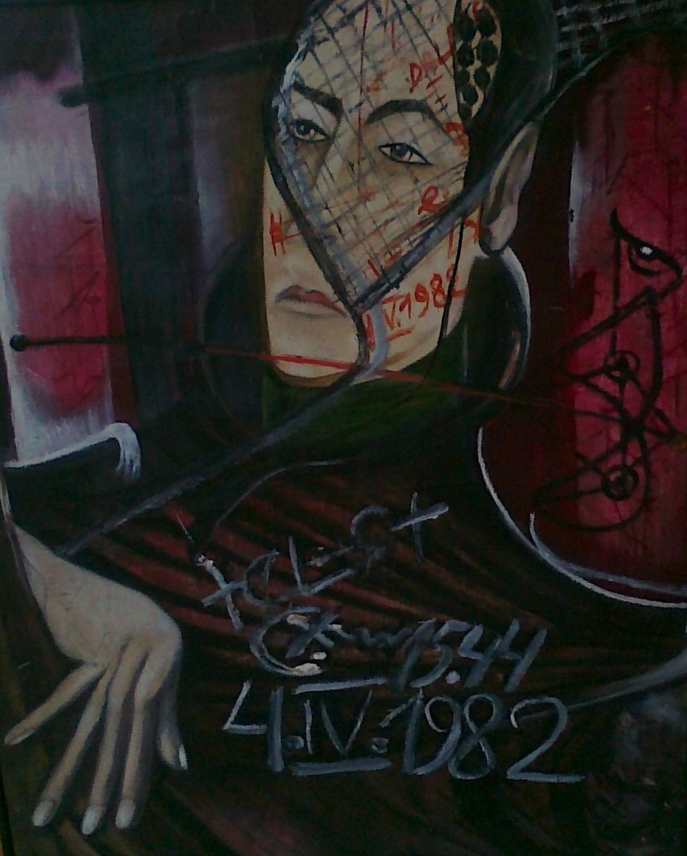 Obraz Danuty Romany Urbanowicz (zbiory Szpitala w Tworkach).